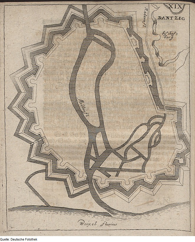 Original image description from the Deutsche FotothekArchitektur & Festungsbau